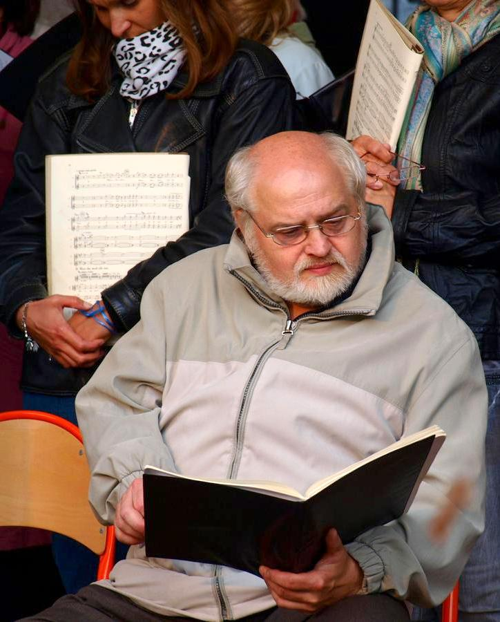 Ivan Kusnjer, koncert Carmina Burana v Libici nad Doubravou